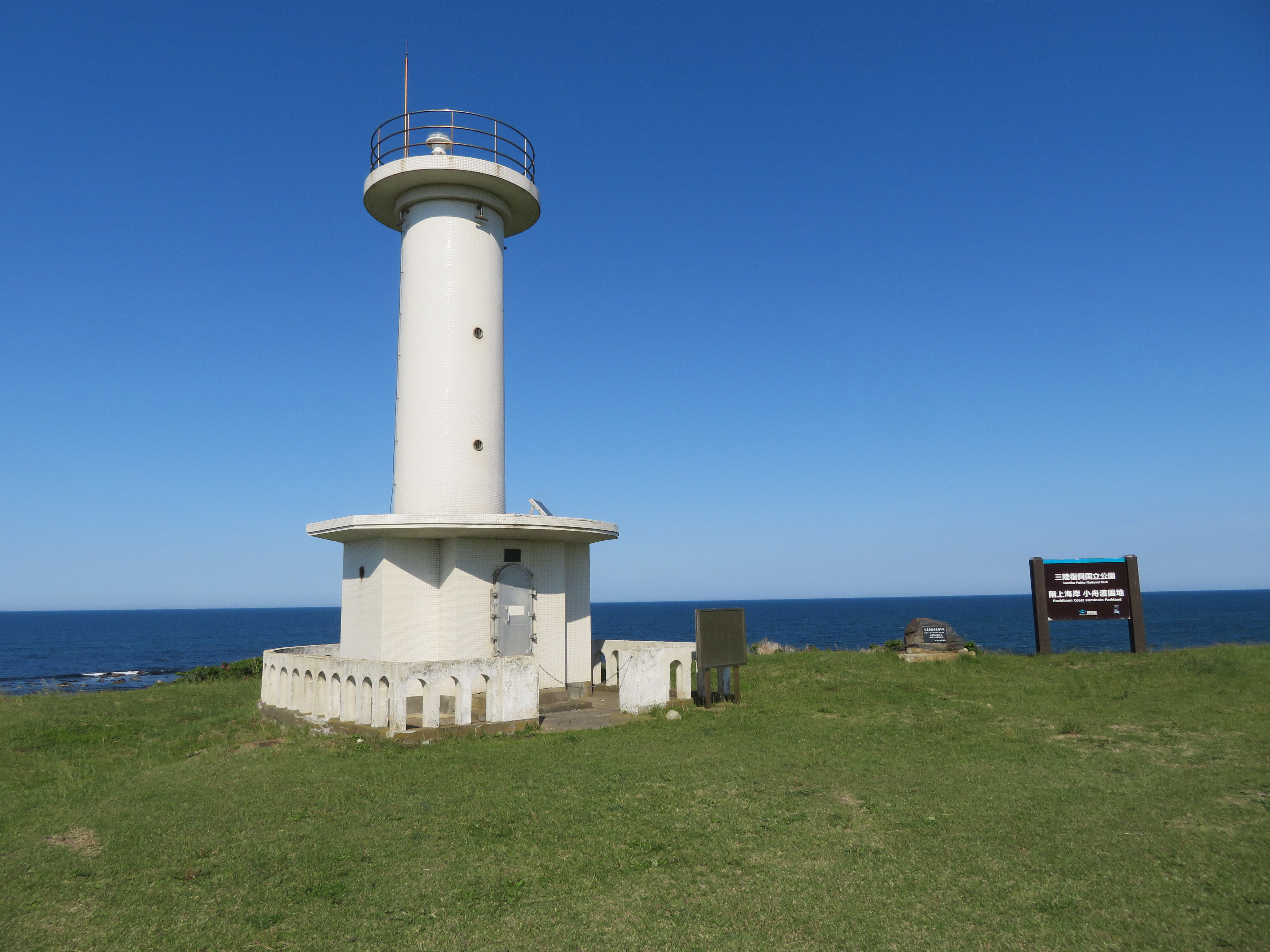 青森県三戸郡階上町に所在する階上海岸小舟渡園地（階上灯台） Canon PowerShot SX720 HS